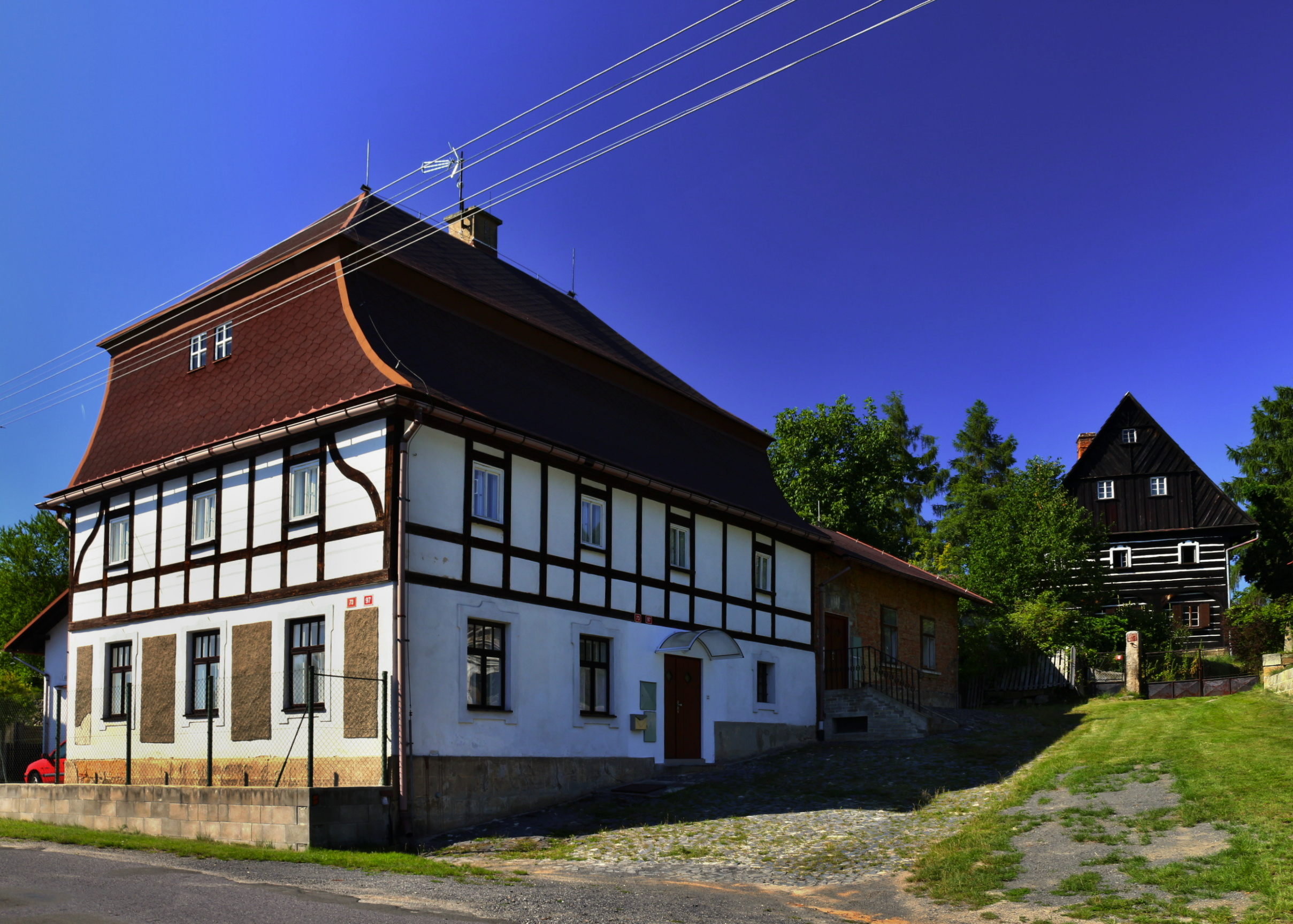 Noviny p. Ralskem